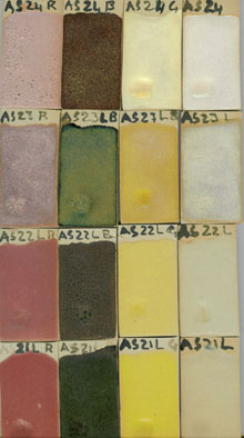 gestookte glazuurproeven bij een temperatuur van 1250 graden